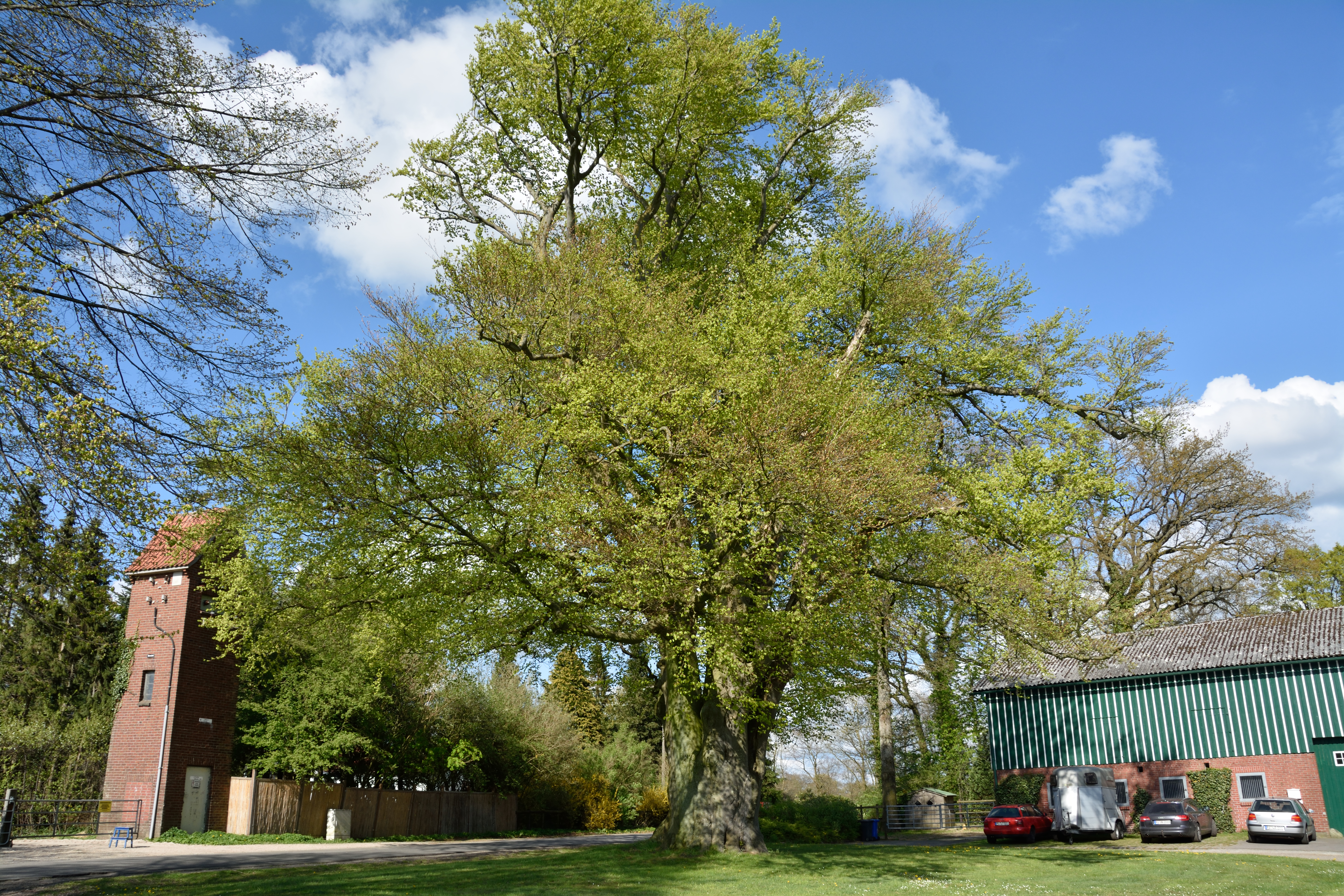 Naturdenkmal im Kreis Pinneberg Rotbuche, Lutzhorn, Hölln 7 Eine der ältesten und mächtigsten Rotbuchen im Kreis Pinneberg